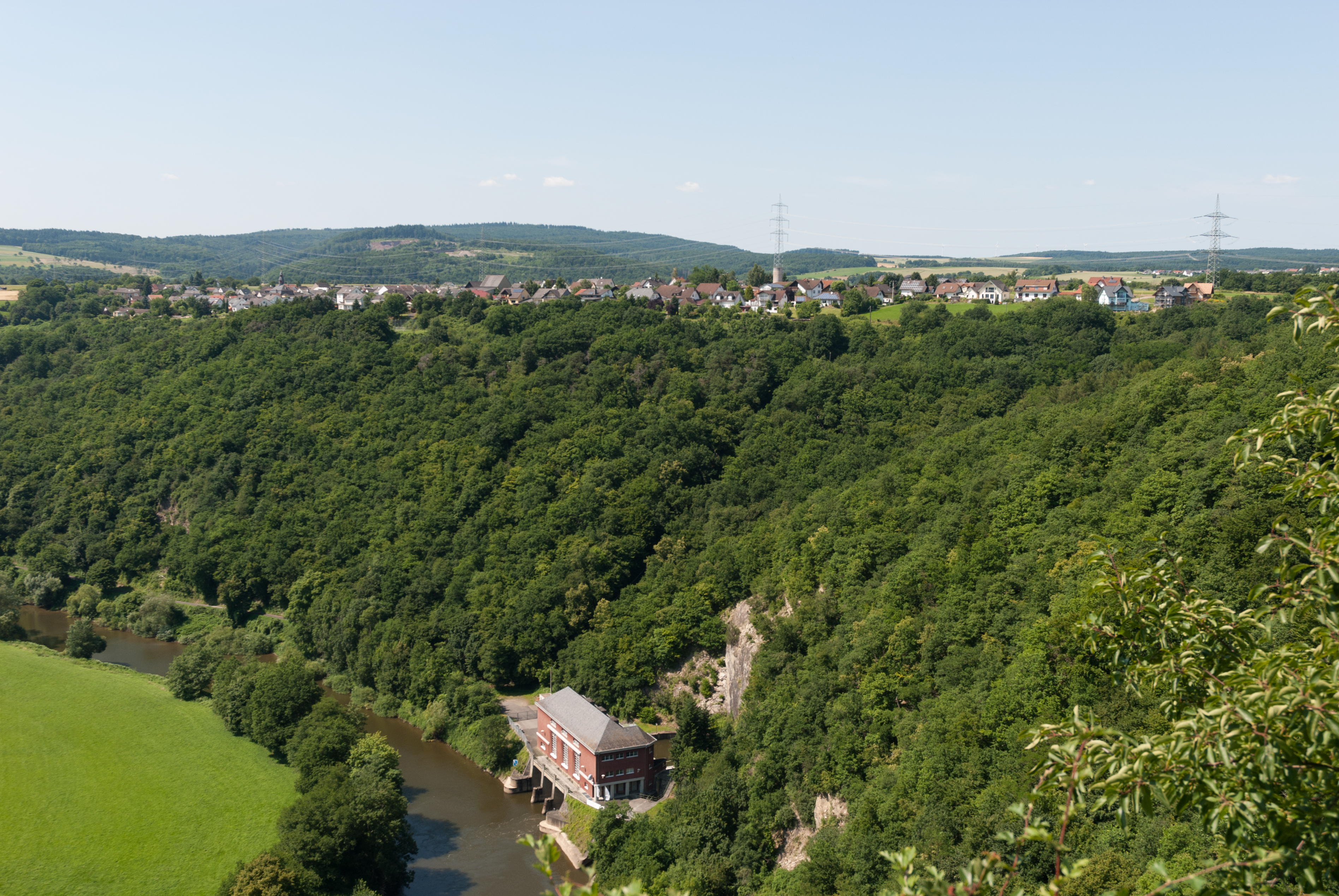 Blick vom Gabelstein auf Cramberg, im Tal die Lahn